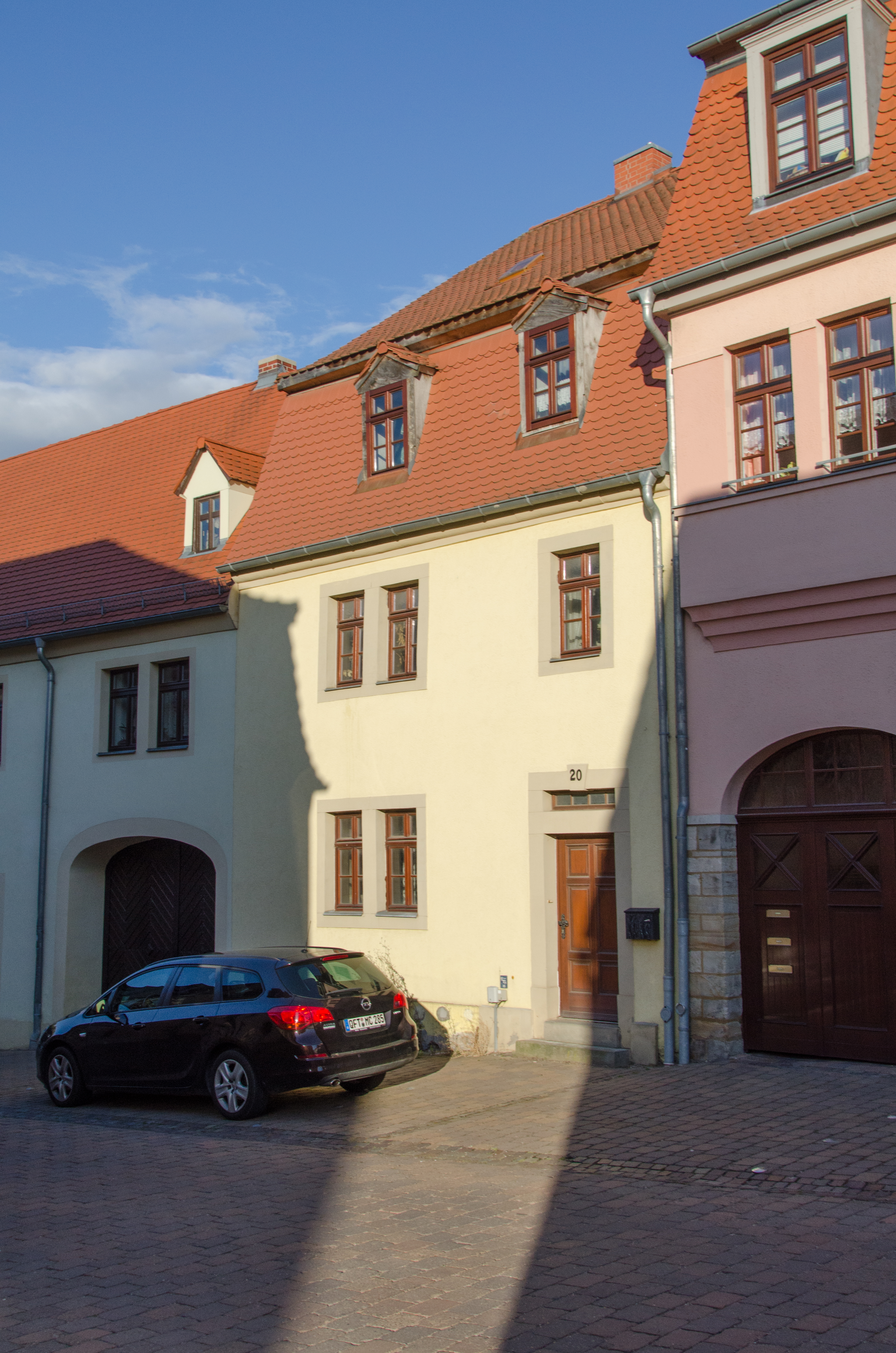 Querfurt, Klippe 20